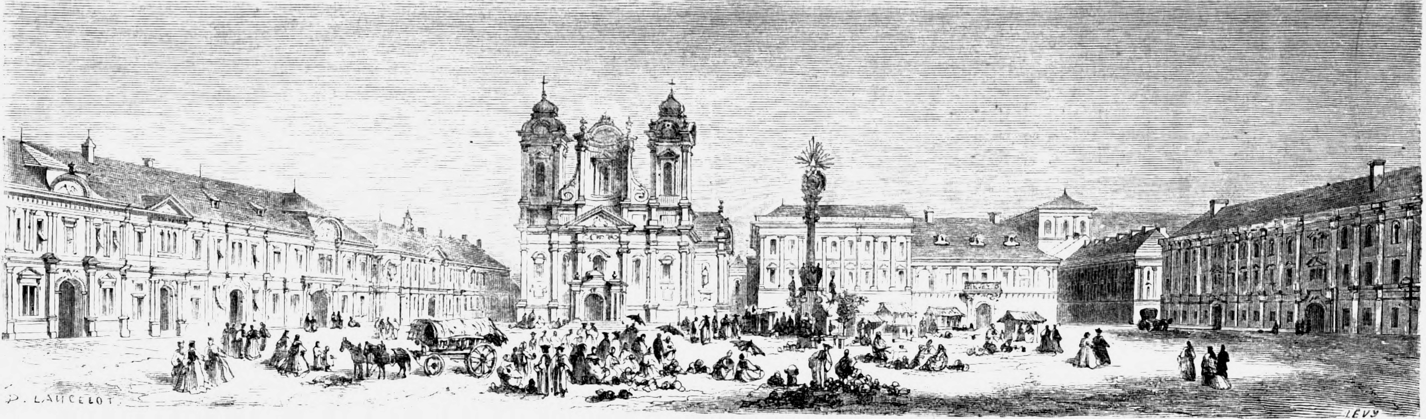 Une place a Temesvar